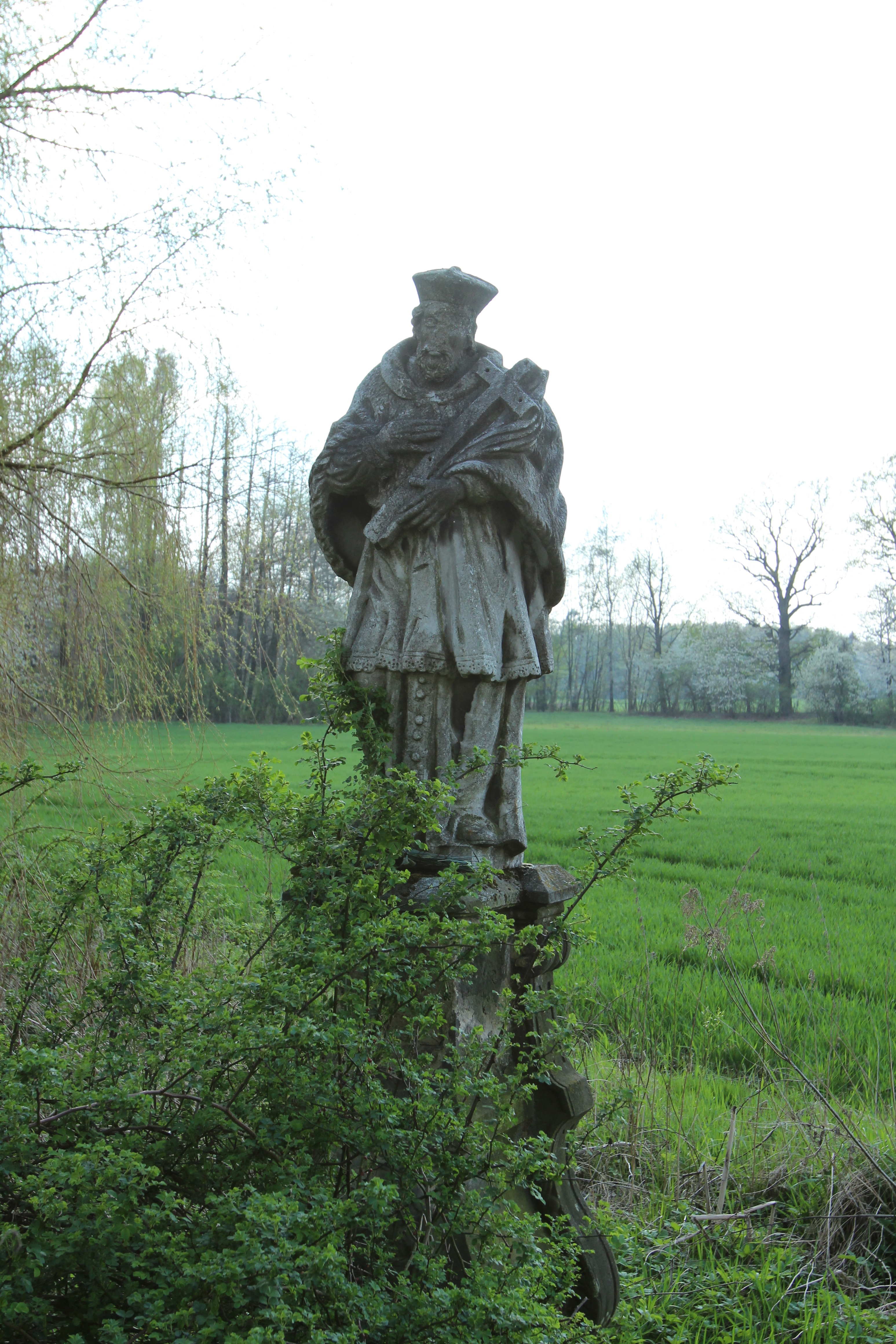 Domaszkowice – wieś w Polsce położona w województwie opolskim, w powiecie nyskim, w gminie Nysa.